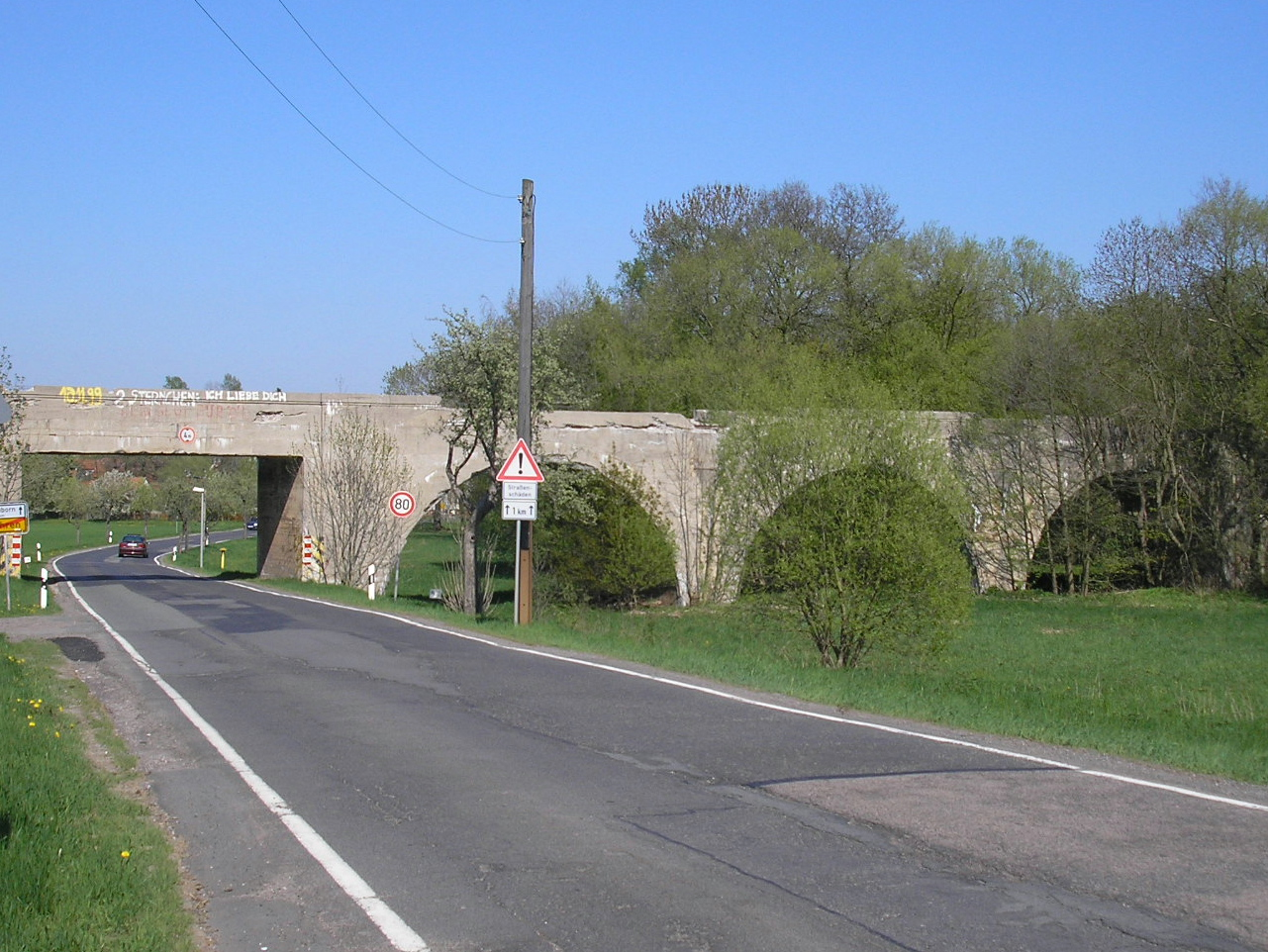 Marode Eisenbahnbrücke der stillgelegten Strecke Ilmenau-Gehren-Großbreitenbach über die Wohlrose und die B88 zwischen Gehren und Jesuborn.